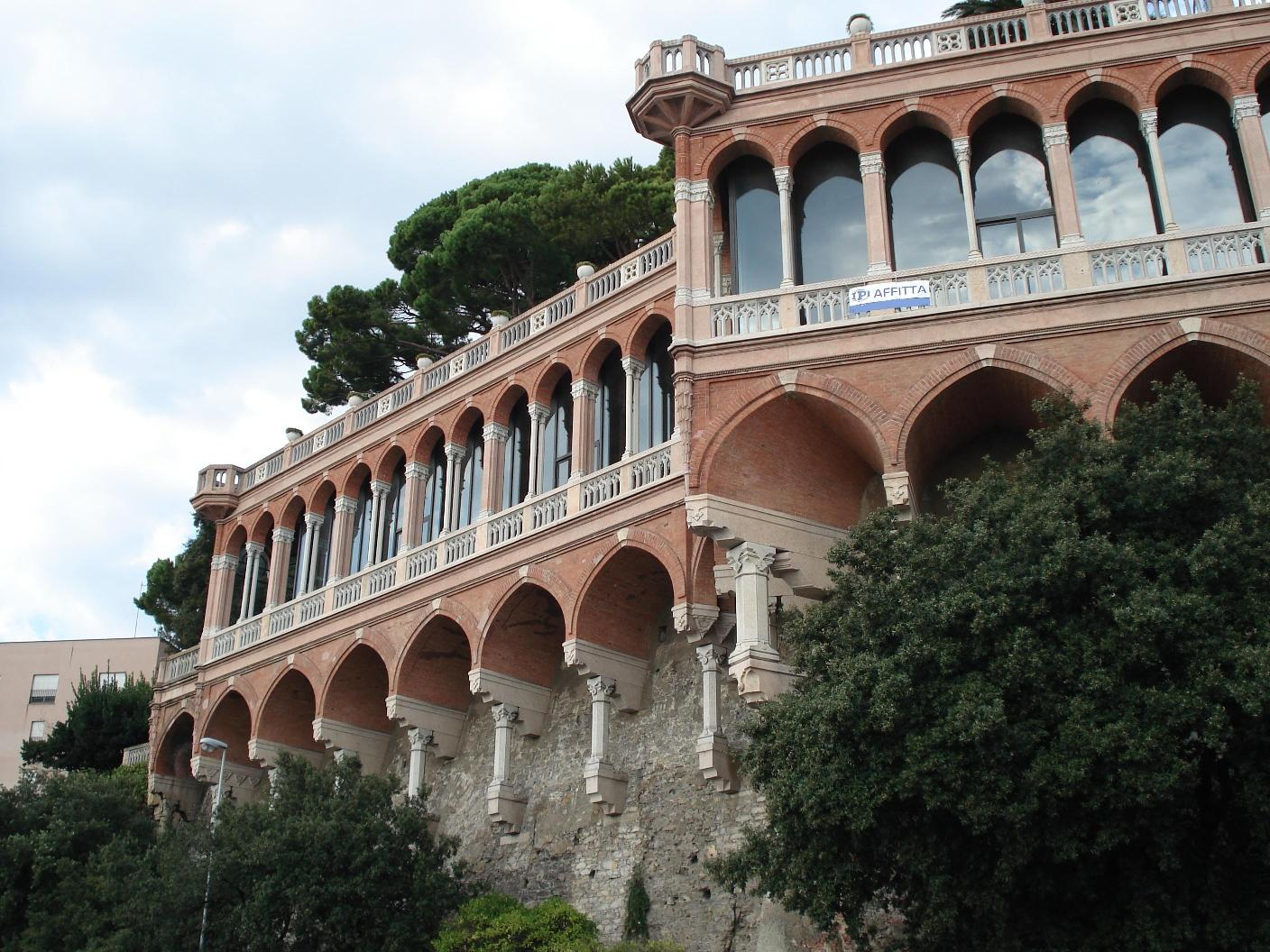 Il porticato sospeso di Villa Mylius a Genova visto da levante